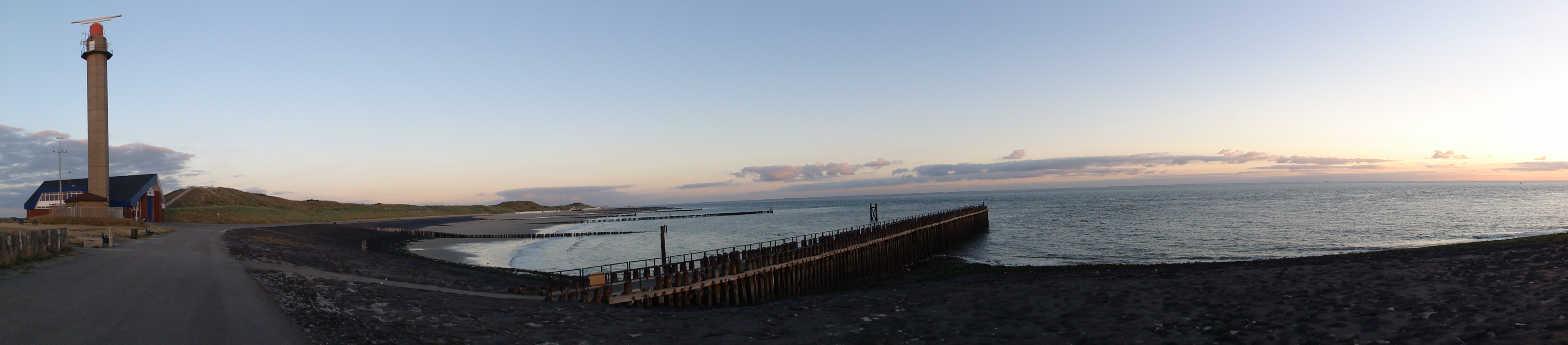 Zuiderhoofd, radartoren en Knrm post kijkend in de richting van Vlissingen